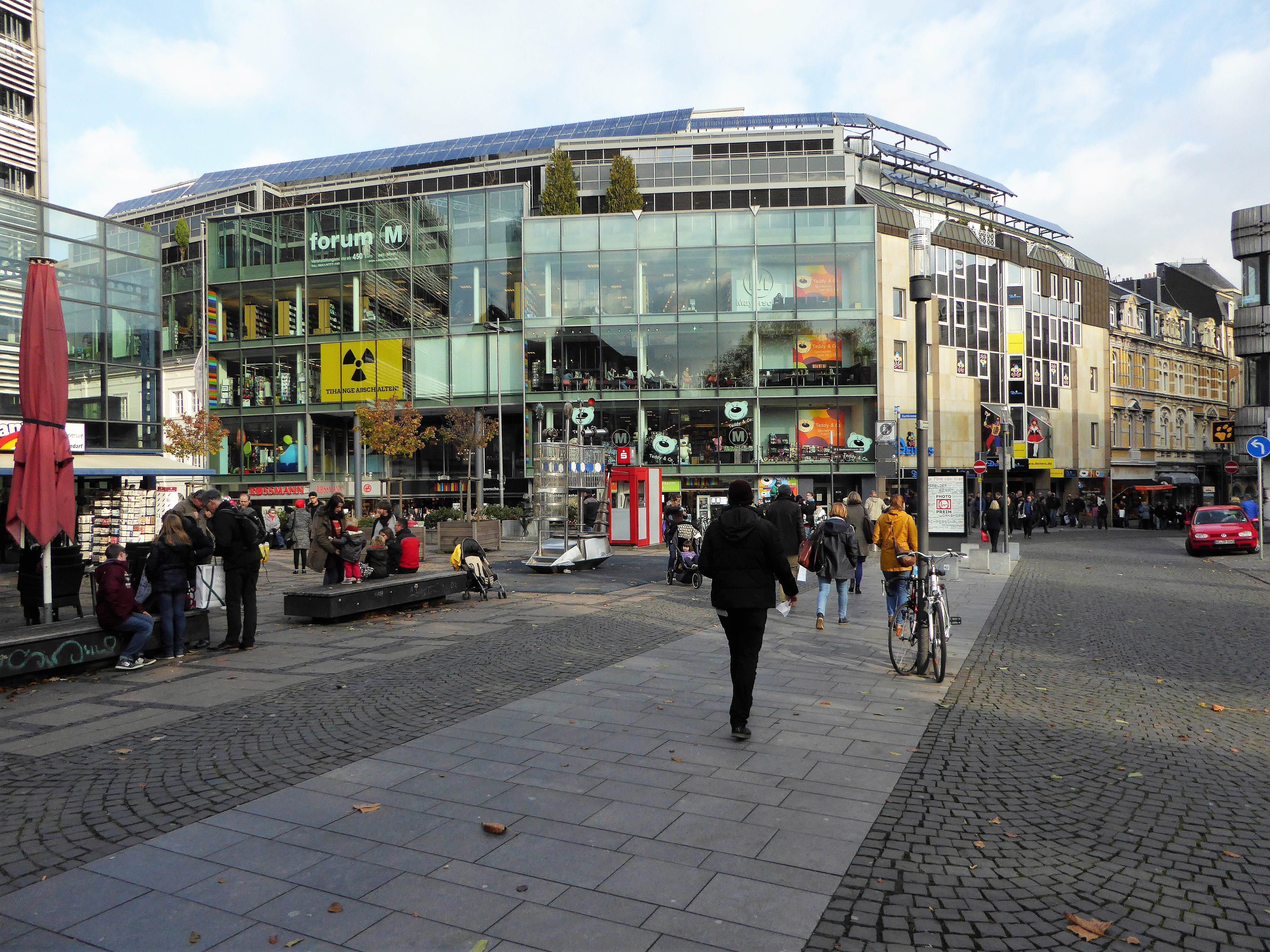 Protest gegen Atomkraftwerk Tihange in Aachen